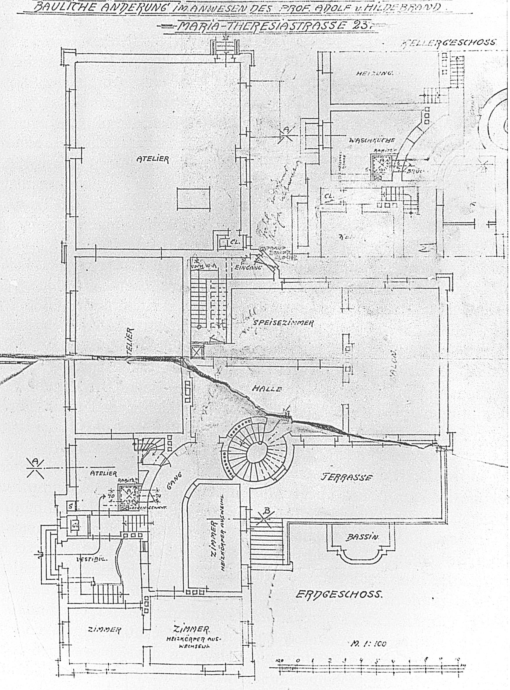 Pläne des Hildebrandhauses in München, Erdgeschoss, Entwurf durch Gabriel von Seidl, Ergänzungen von Adolf von Hildebrand